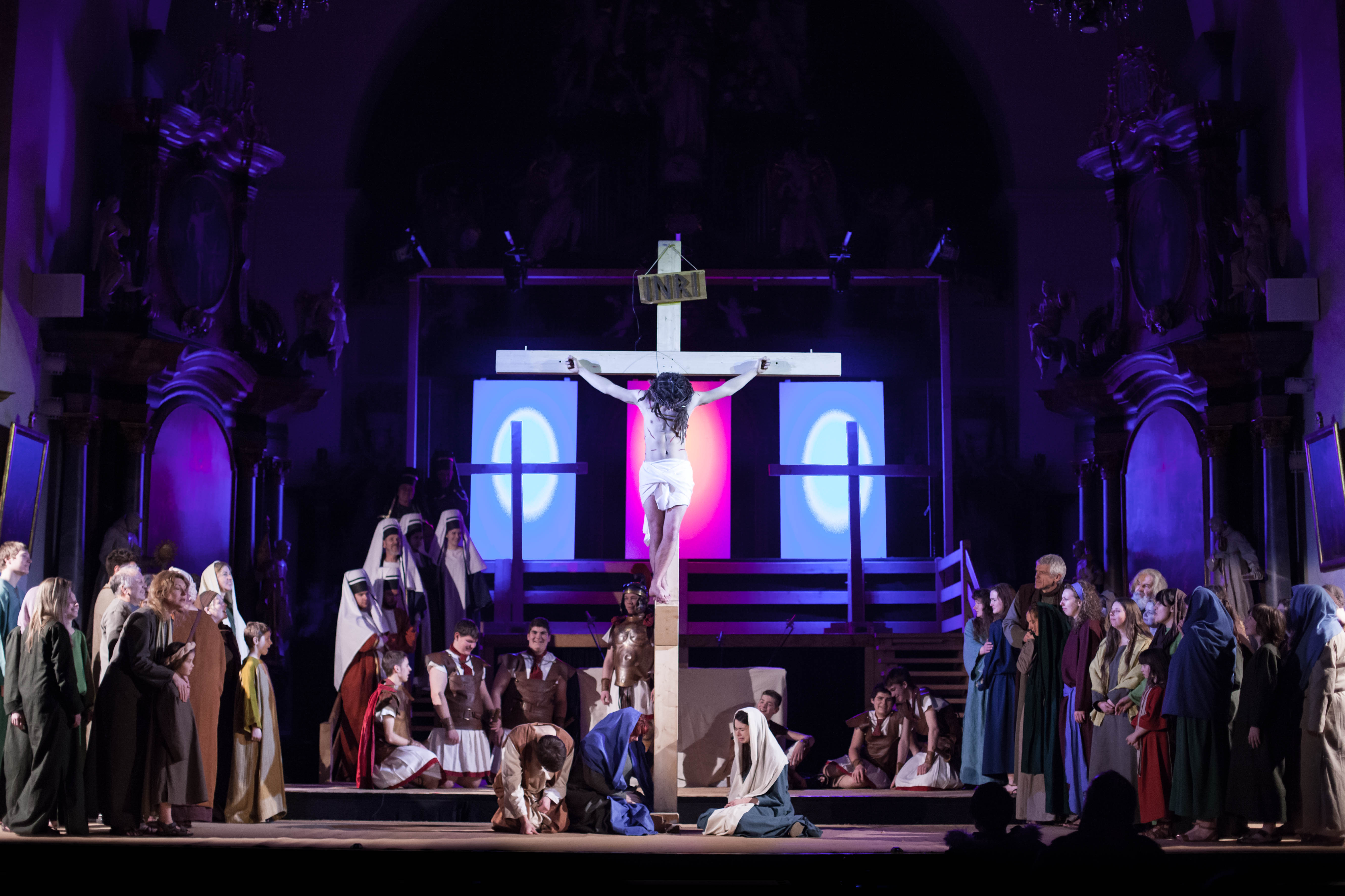 Aufführung der Passionsspiele Salmünster während der 14.Saison (2014)